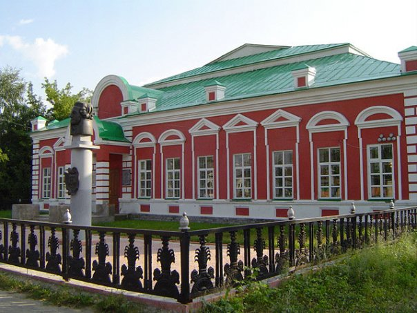 Темниковский историко-краеведческий музей имени адмирала Ушакова